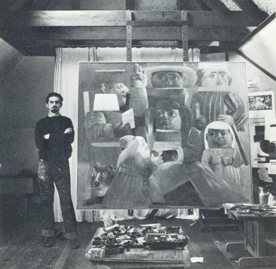 Fernando Botero y La Camara degli Sposi, 1958